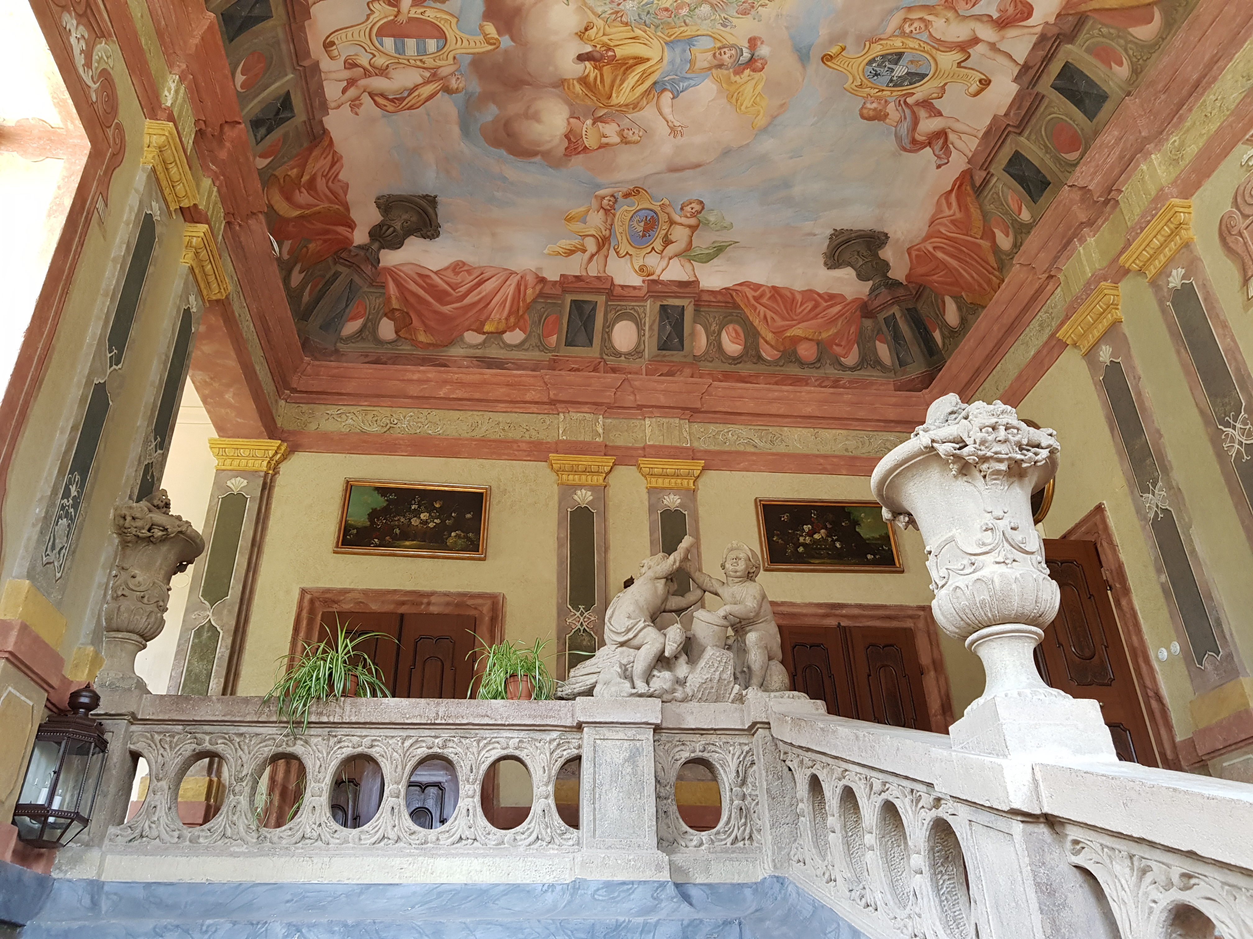 Interiéry zámku Manětín